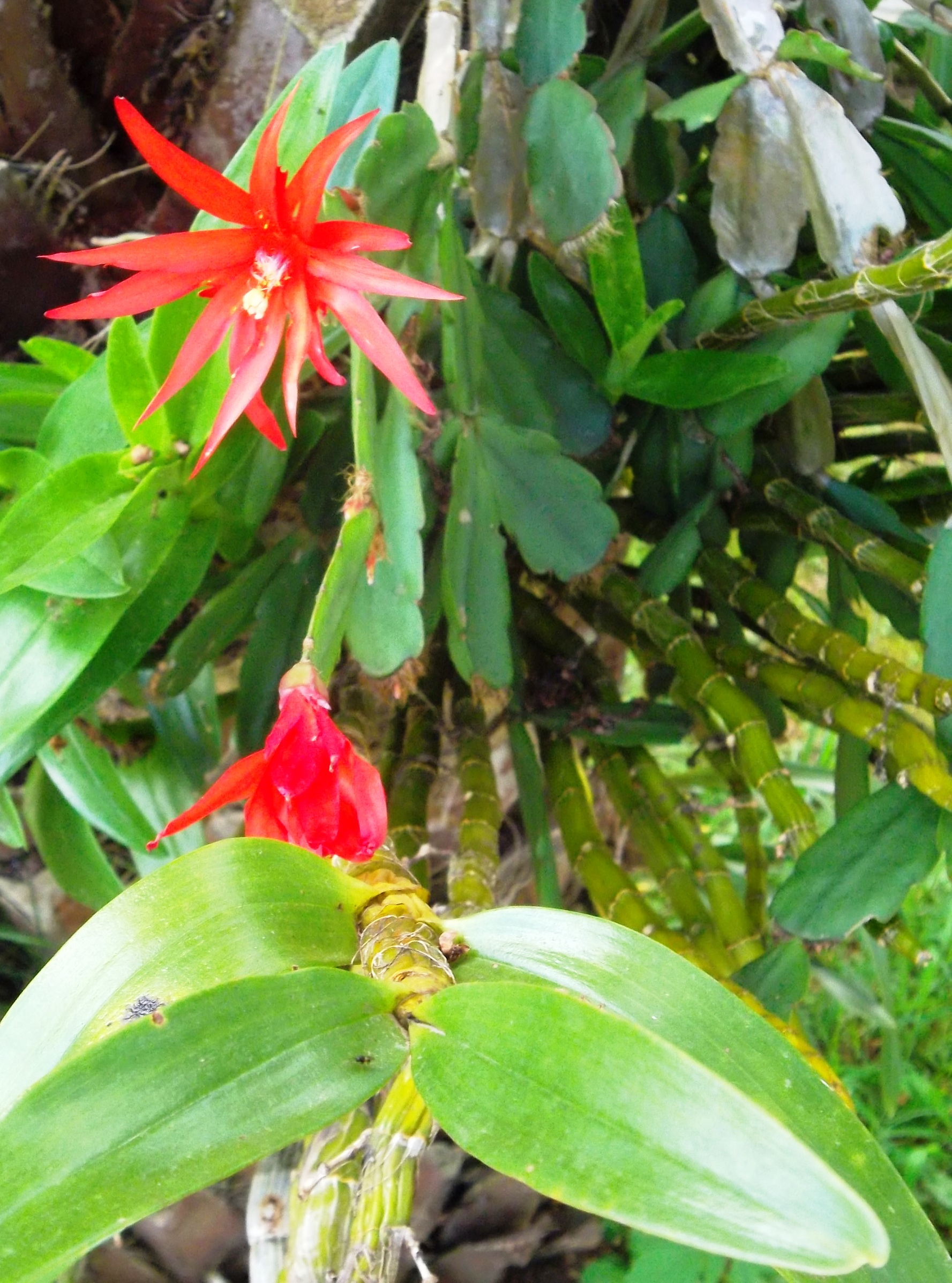 Exemplares da flora de Santa Catarina